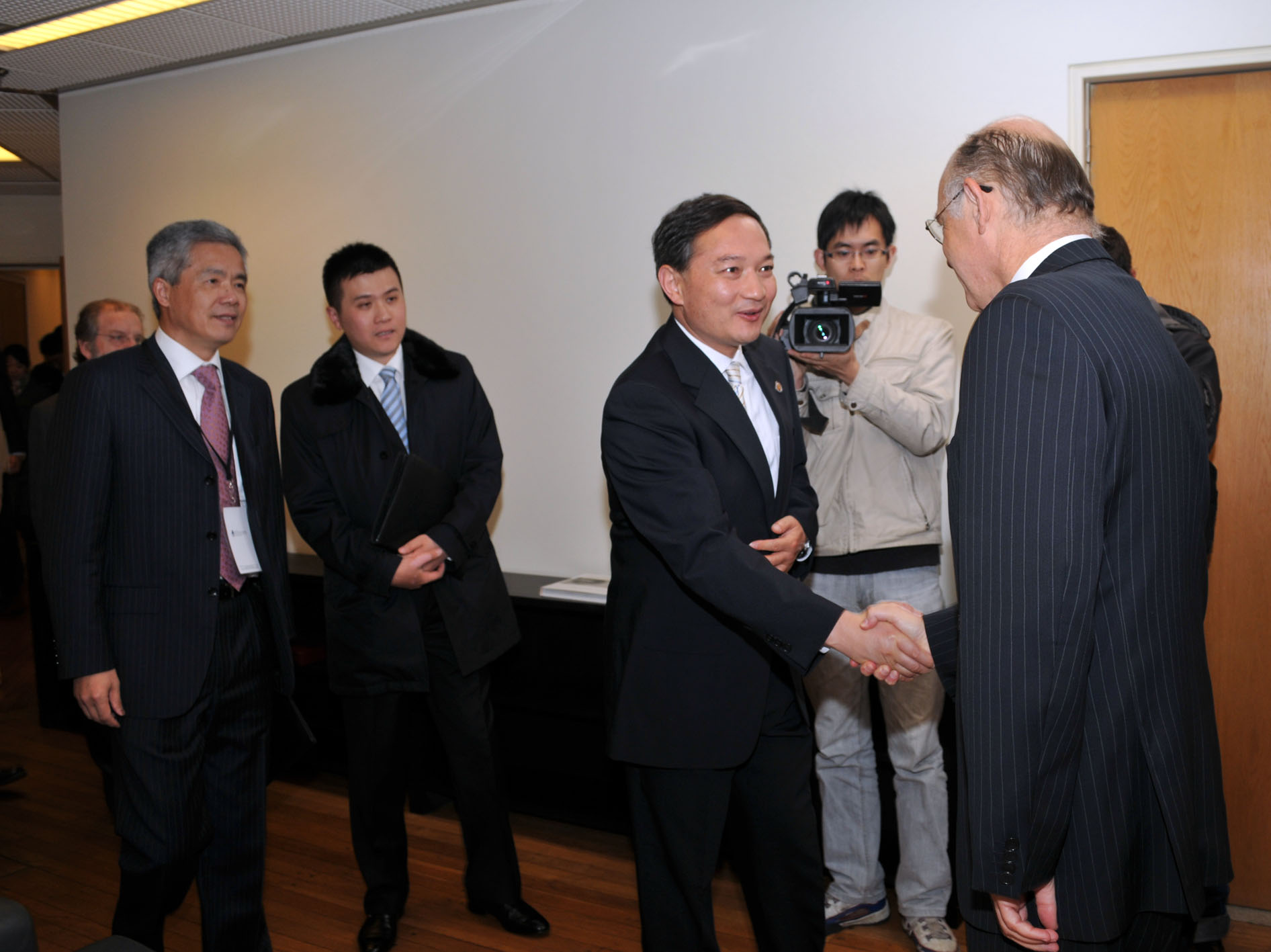 Buenos Aires, Agosto 23 de 2011. El Canciller argentino, Héctor Timerman, recibió esta tarde en su despacho al Vicecanciller y Responsable para América Latina y el Caribe de la República Popular China, Zhang Kunsheng, quien visita nuestro país junto a una importante delegación en el marco del V Foro para la Cooperación entre América Latina y Asia del Este (FOCALAE) que hasta el jueves desarrolla en el Palacio San Martín. foto Roberto Daniel Garagiola